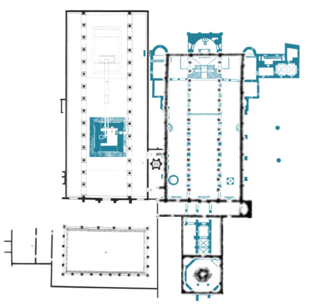 Post Theodorian Basilica di Aquileia, early Vth Century (corrected2)